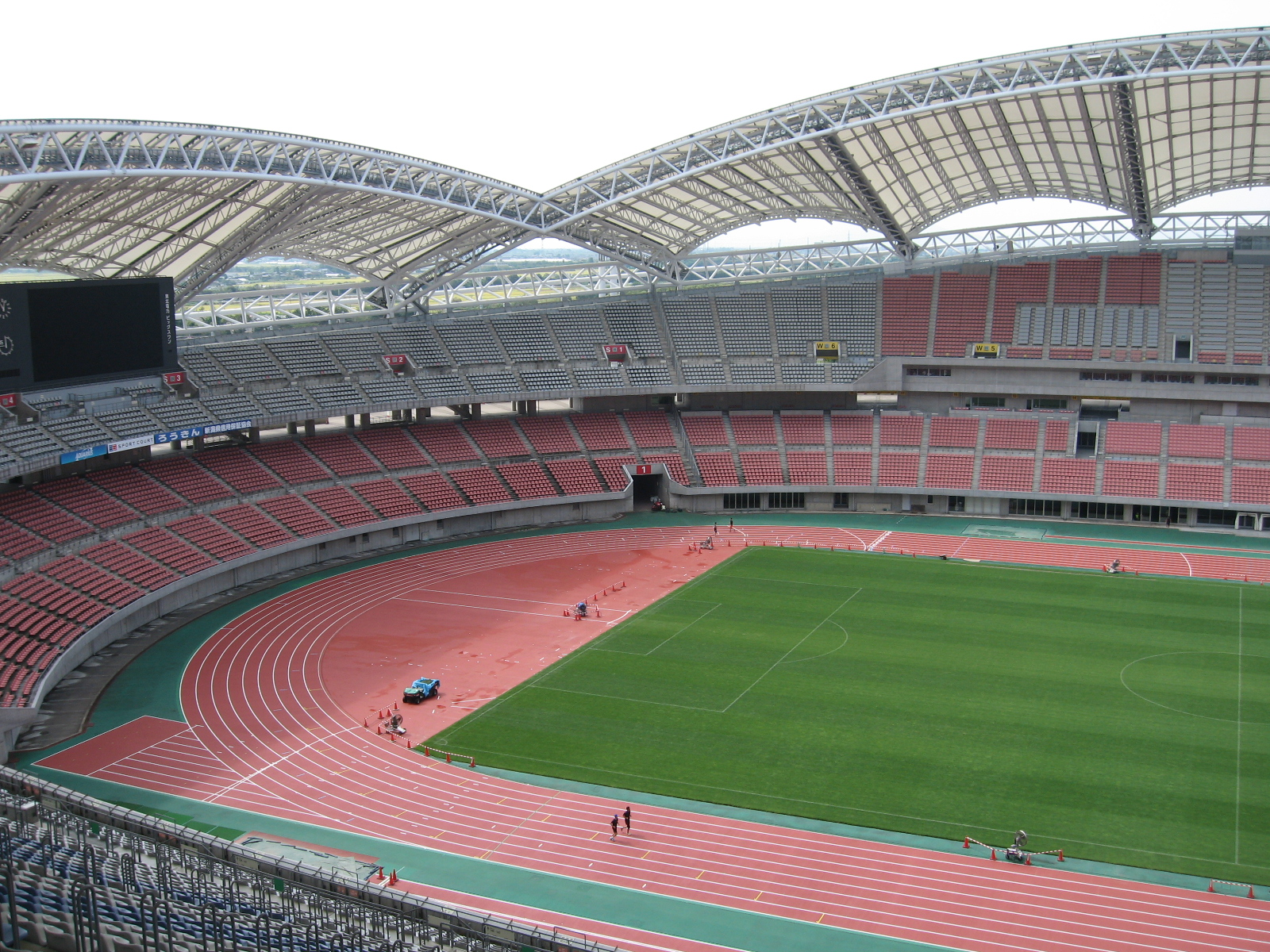 新潟市中央区。新潟スタジアム、陸上トラックの改修を終えた直後のグラウンド。